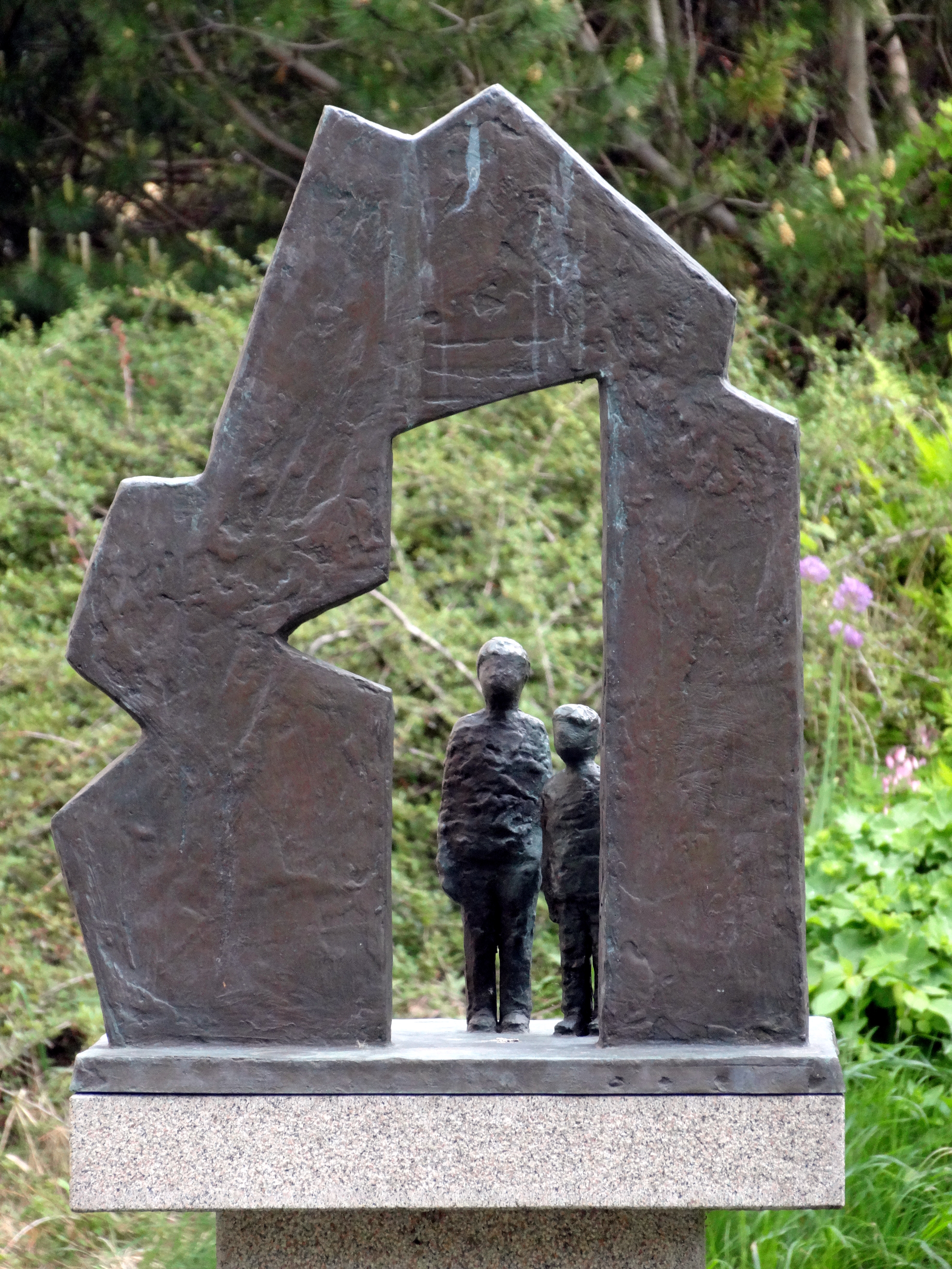 Här bor vi av Margareta Ryndel, 1994. Fjädermolnsgatan i Göteborg.